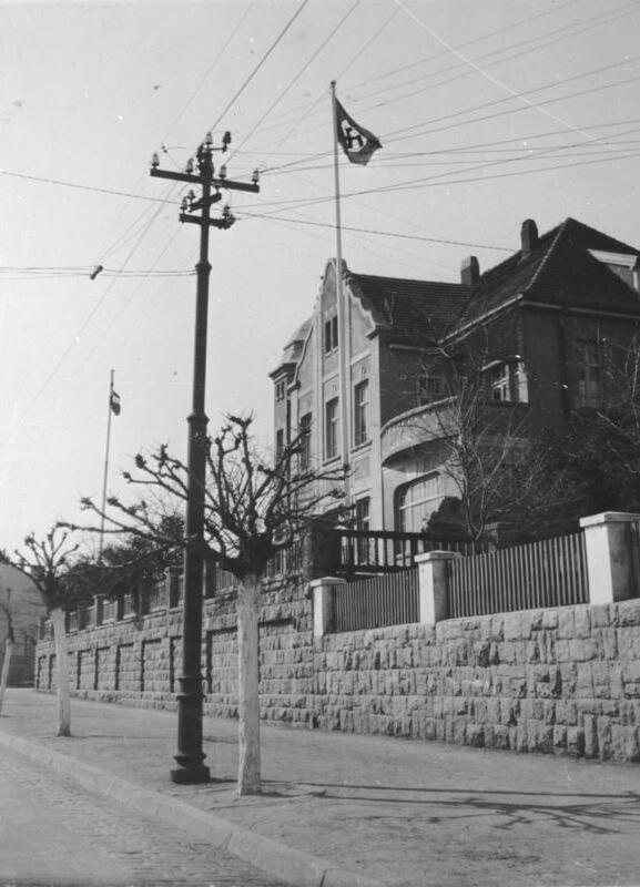 China, TsingtauDeutsches Konsulat